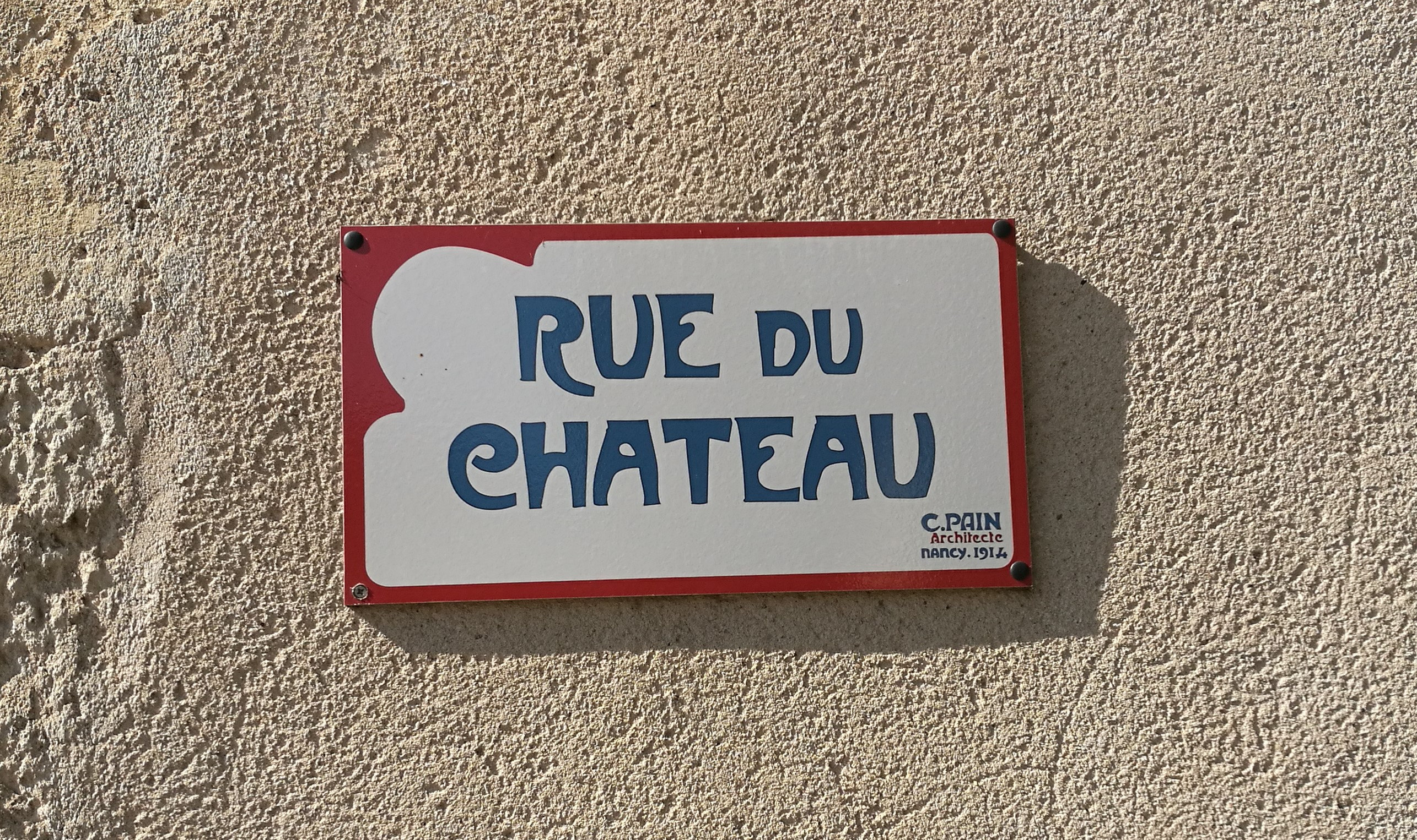 Panneau Rue Lanfroicourt